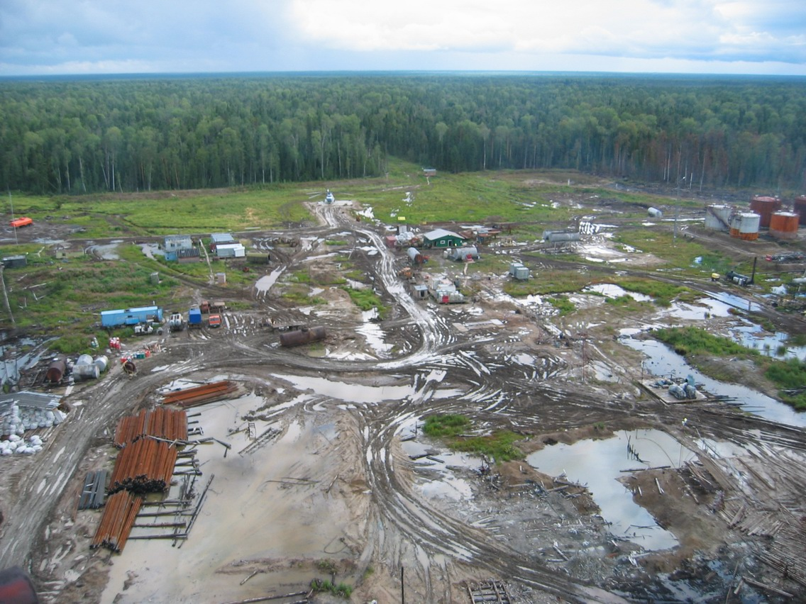 Zapadno-Kluchevskoe oil, Tomsk region, Siberia RU: Западно-Ключевское месторождение, Каргасокский район, Томская область